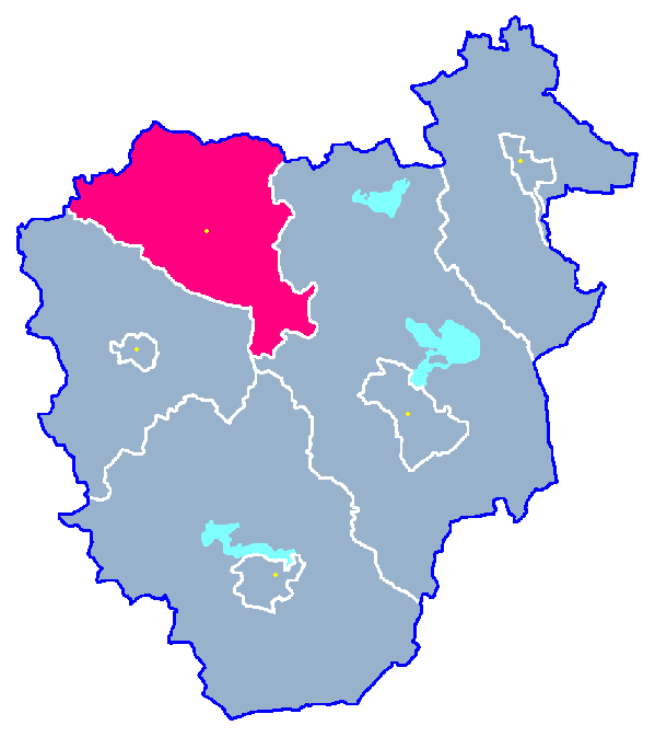 Locator maps for communes in województwo zachodniopomorskie : Grzmiąca gm.png (podział na gminy)